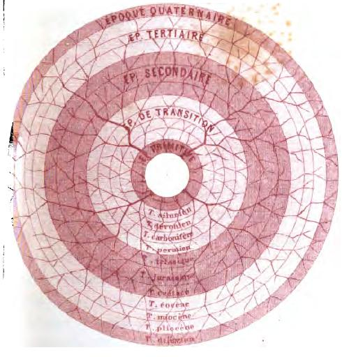 Emeterio Iglesias Jiménez. Page 272-bis du livre de Pierre Trémaux.